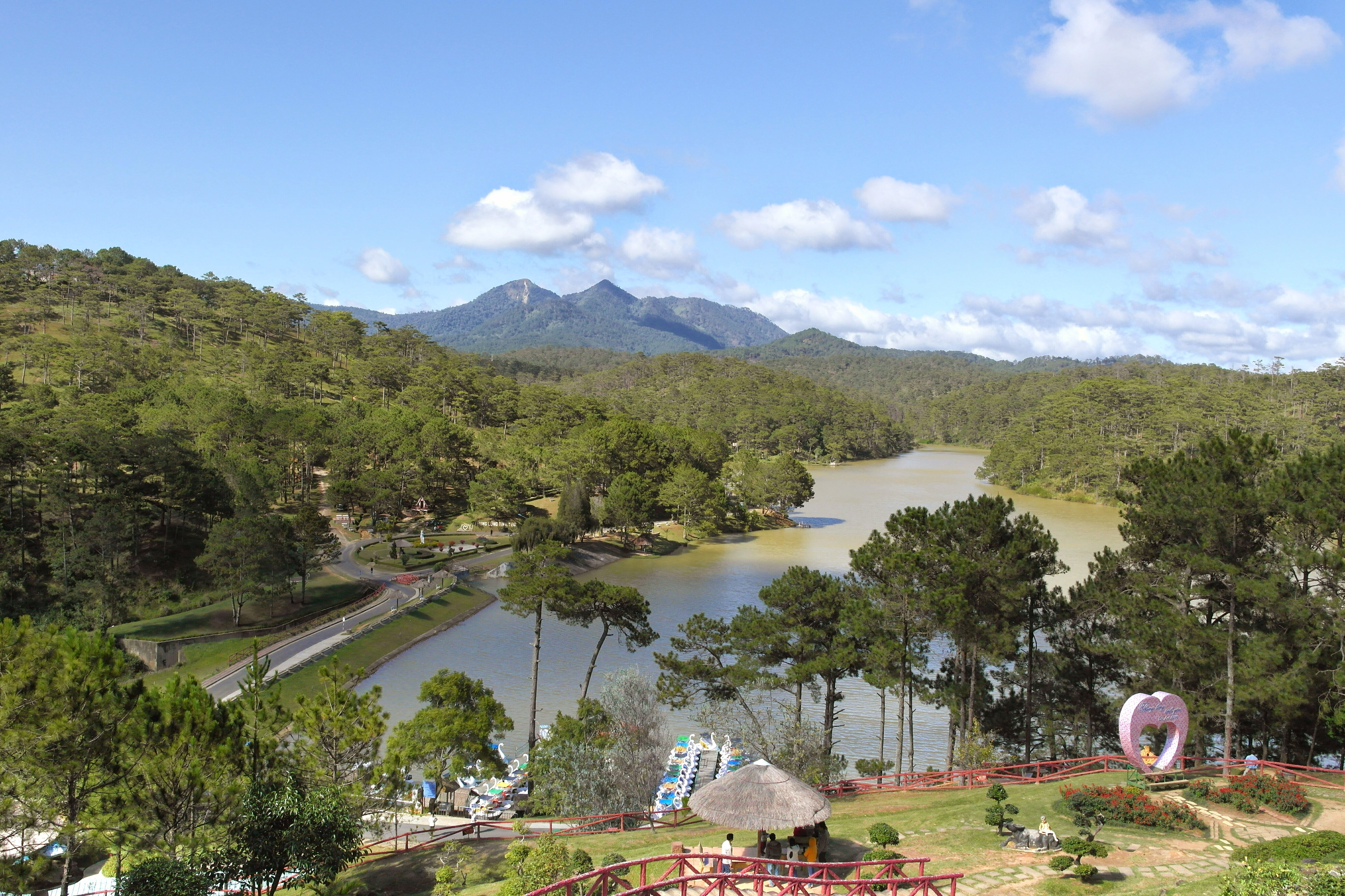 Đương lên đôi Mimosa thung lung tinh yêu